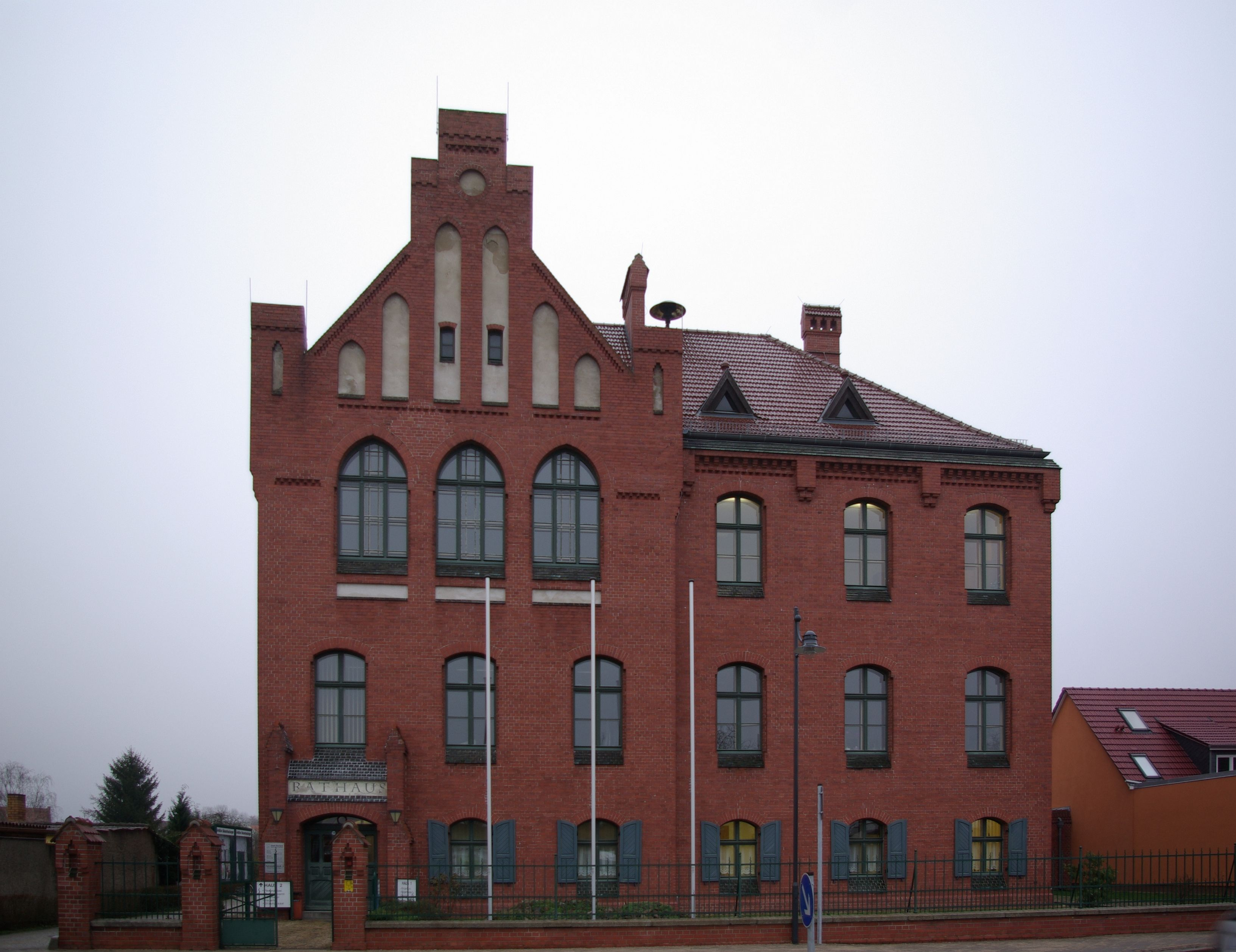 Storkow in Brandenburg. Das Rathaus war früher das Amtsgericht und steht heute unter Denkmalschutz.